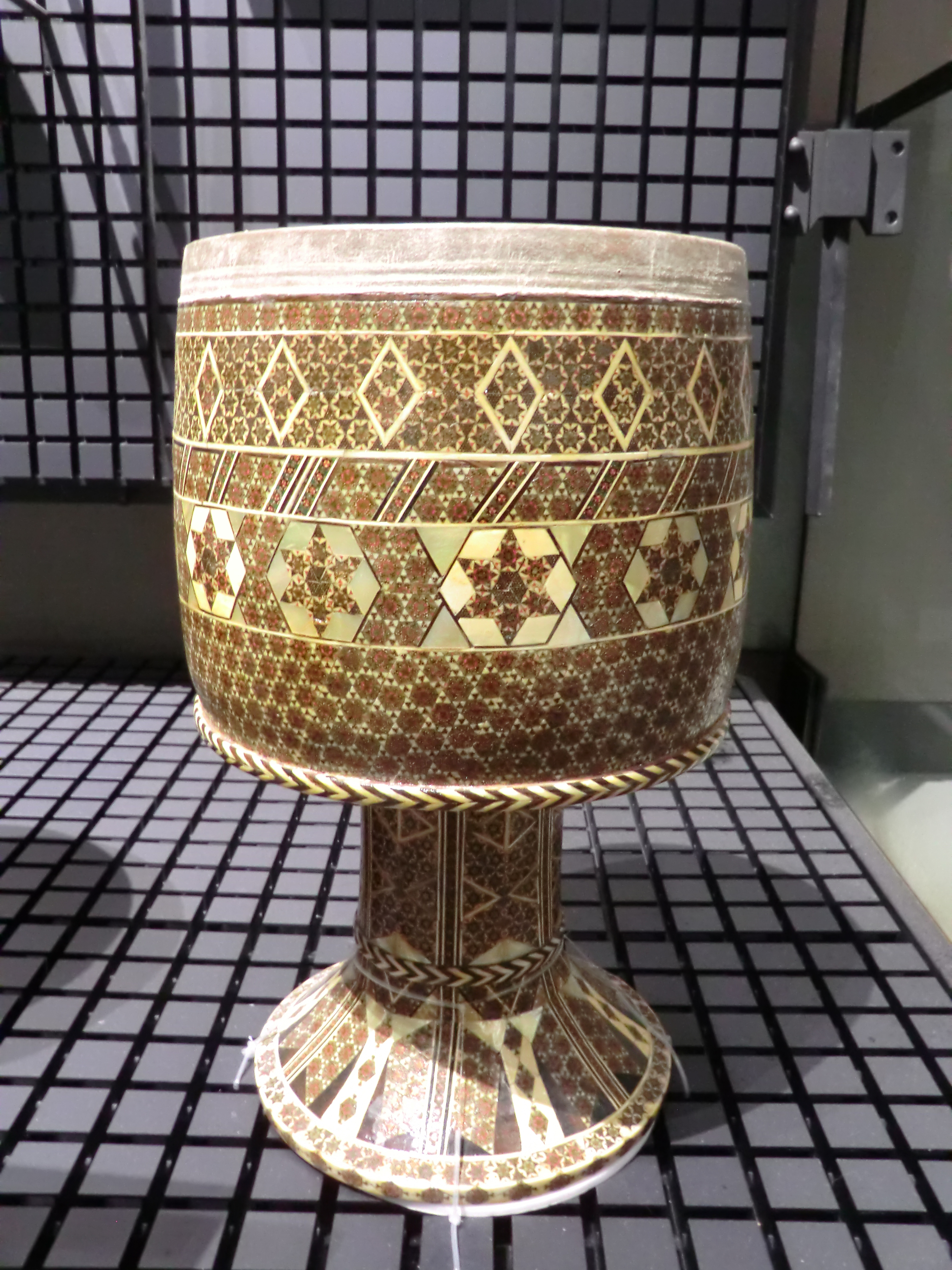 幅27(cm)×高さ42(cm)／重量2.77(kg)